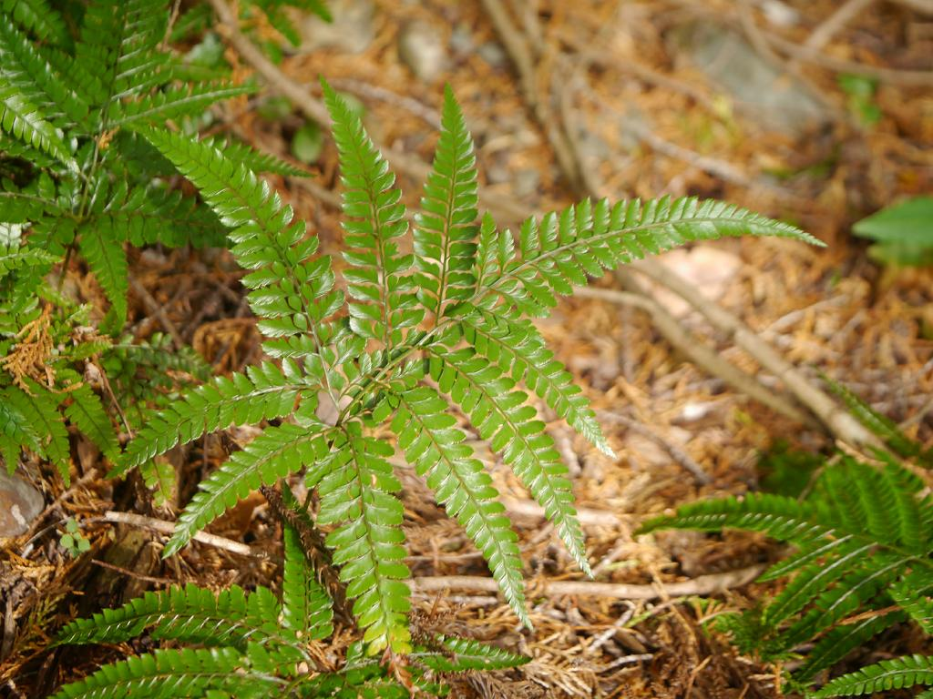 Arachniodes exilis：ホソバカナワラビ 2015/12/13 和歌山県白浜町：Shirahama Town, Wakayama Pref. Japan